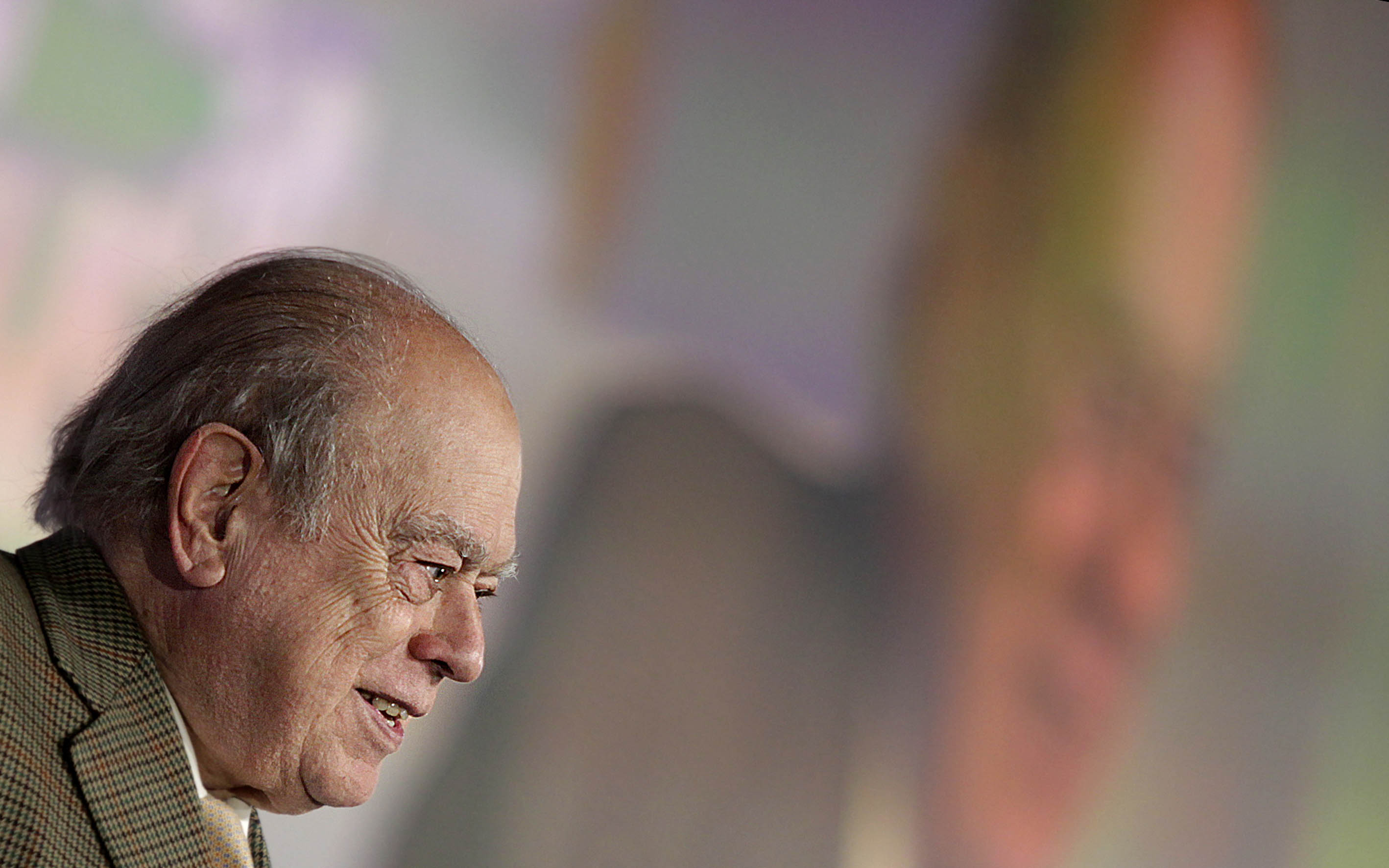 23.03.2012, Reus Inauguració del 16è Congrés de Convergència Democràtica de Catalunya a Reus. Jordi Pujol, President Fundador. Foto: CDC/Jordi Play